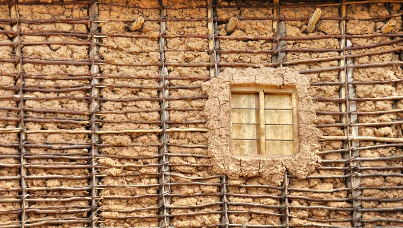 Mud and Sticks, Tanzania